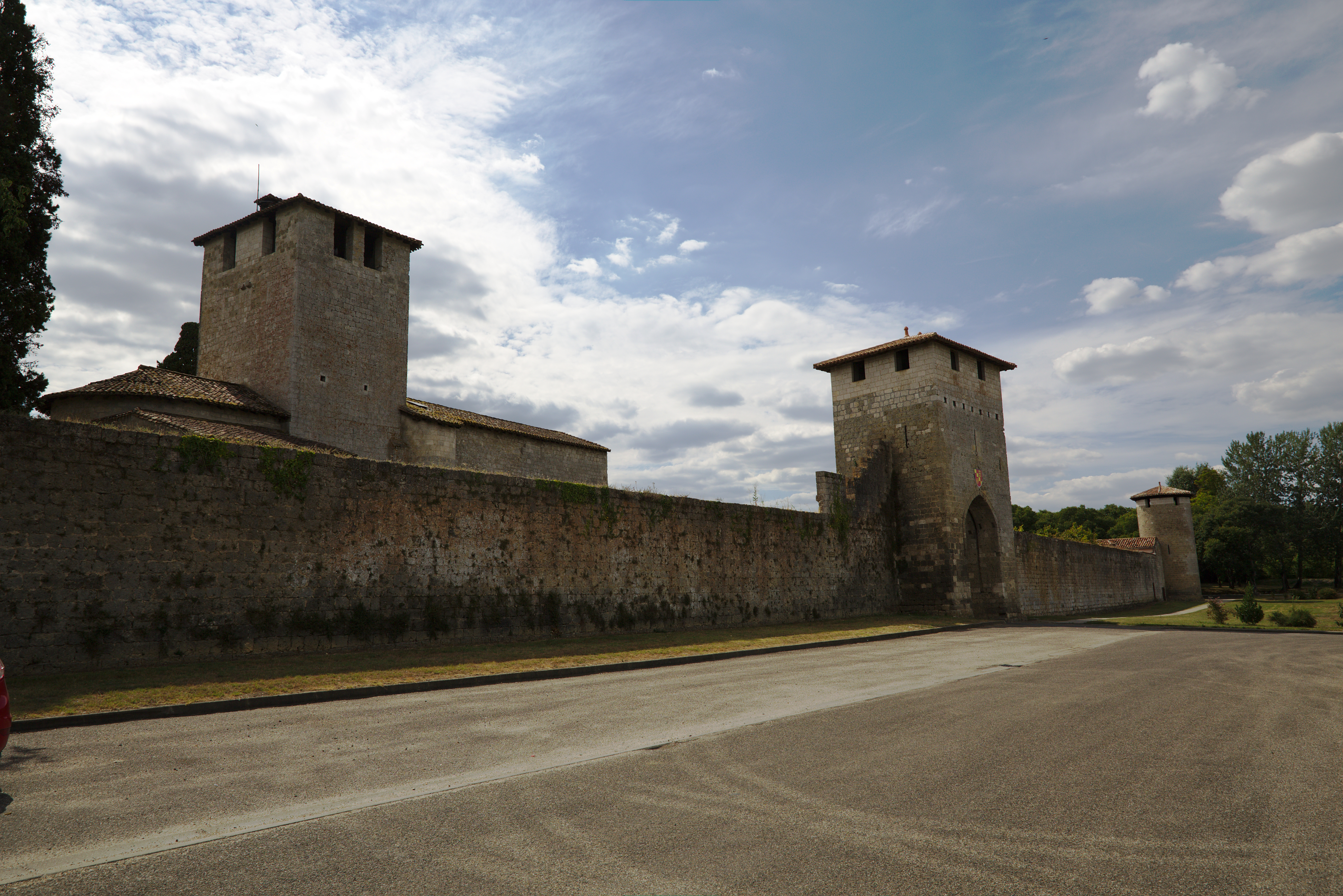 Enceinte et tours de Vianne